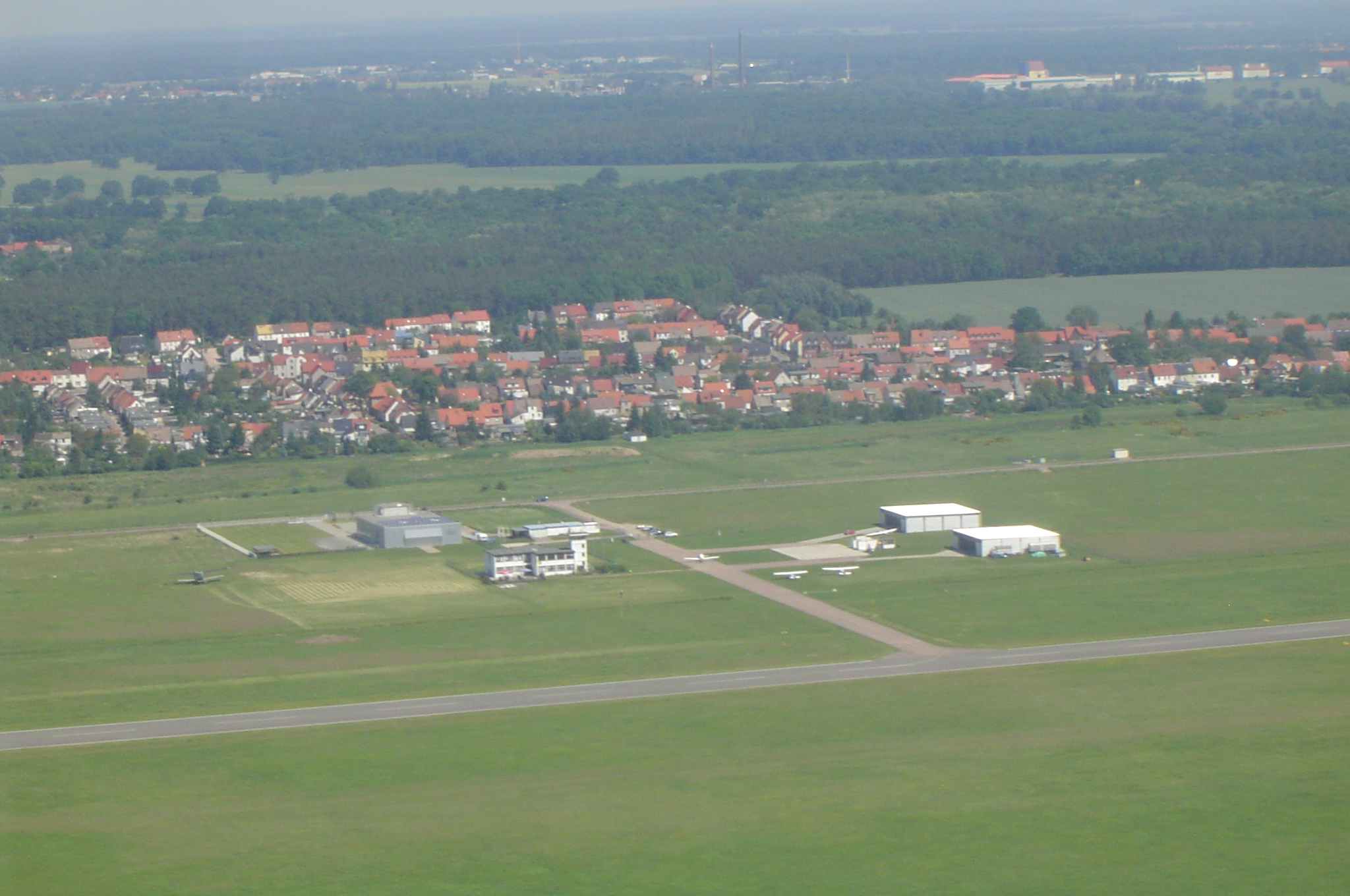 Luftbild Dessau: Flugplatz